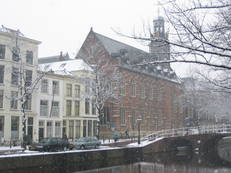 Academiegebouw, Universiteit Leiden; eigen werk (GFDL)